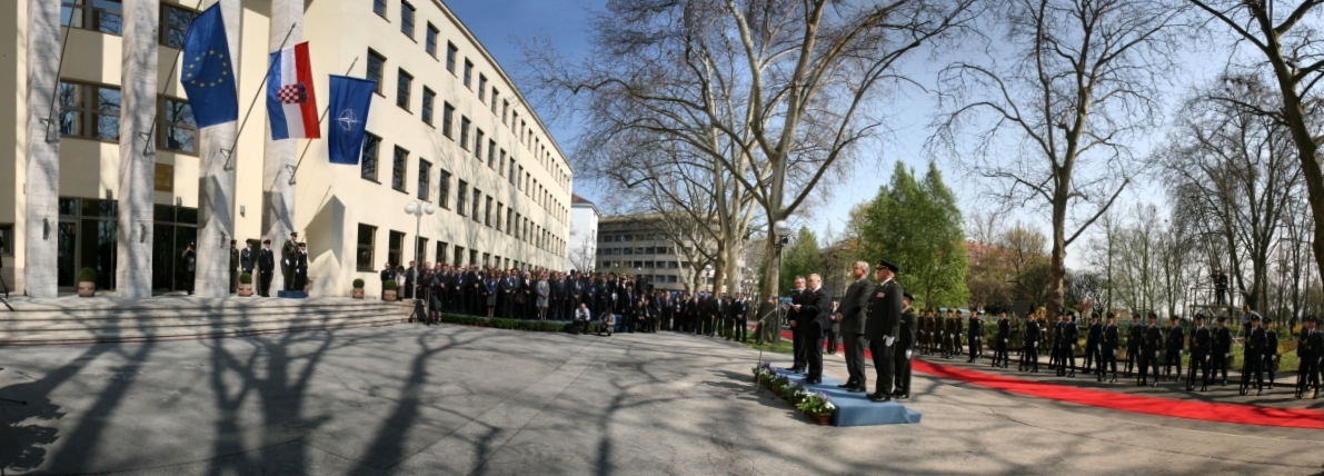 Svečanost podizanja NATO-ve zastave ispred zgrade MORH-a u Zagrebu.